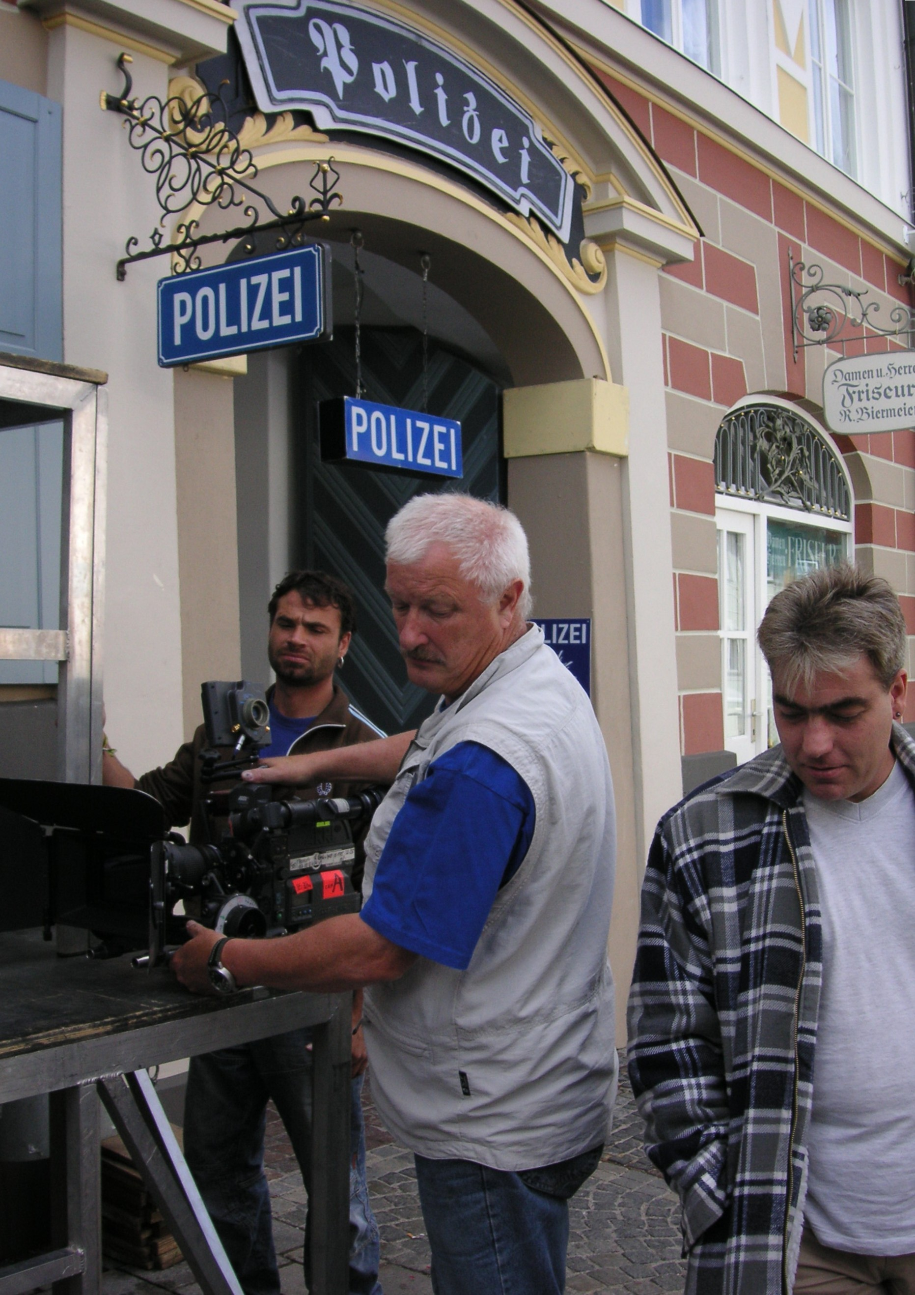 Dreharbeiten für "Der Bulle von Tölz" auf der Marktstraße in Bad Tölz, September 2006